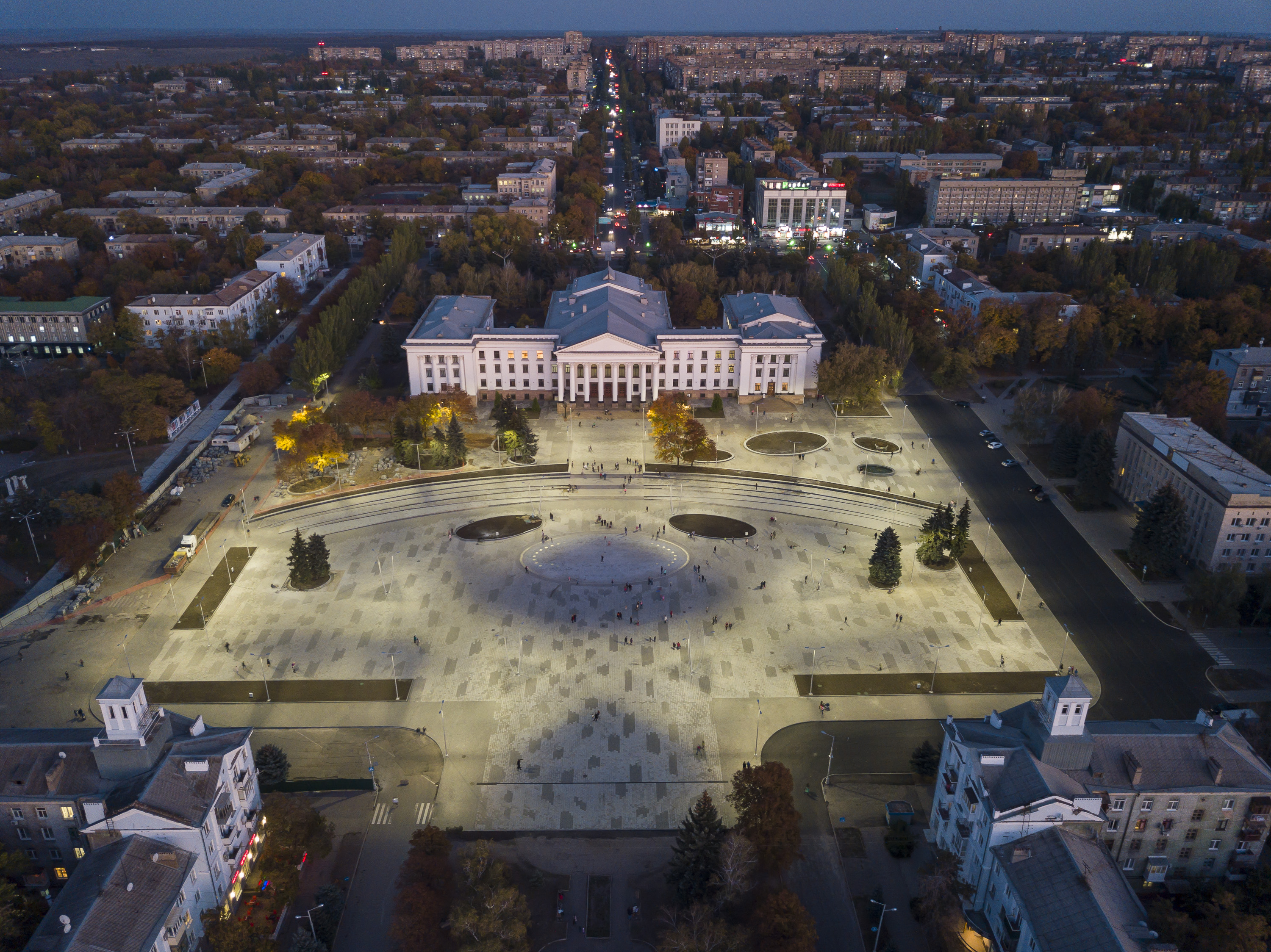 Палац культури та техніки Новокраматорського машинобудівного заводу, Краматорськ, пл. Миру (Леніна), 1